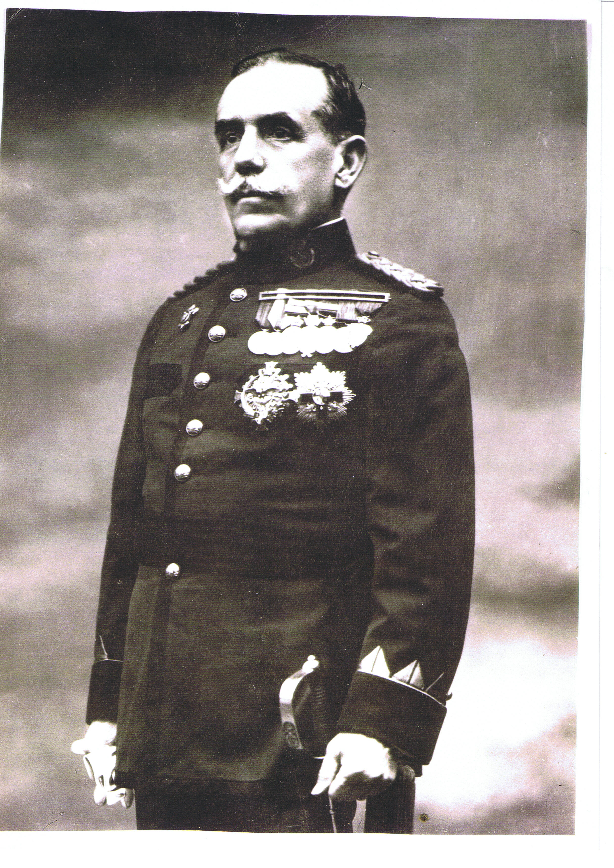 Fotografia del Ministro de la Guerra del Reino de España Sr Don Jose Villalba y Riquelme año 1920